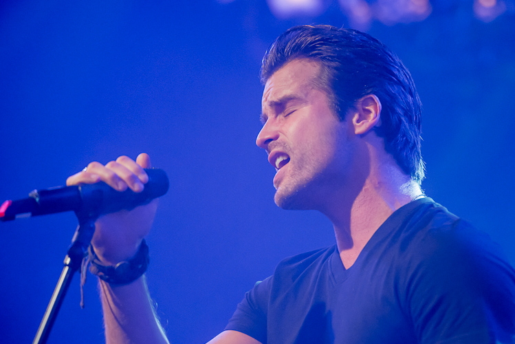 Patrick Nuo live im Hotel Schweizerhof Luzern, 22. Dezember 2012